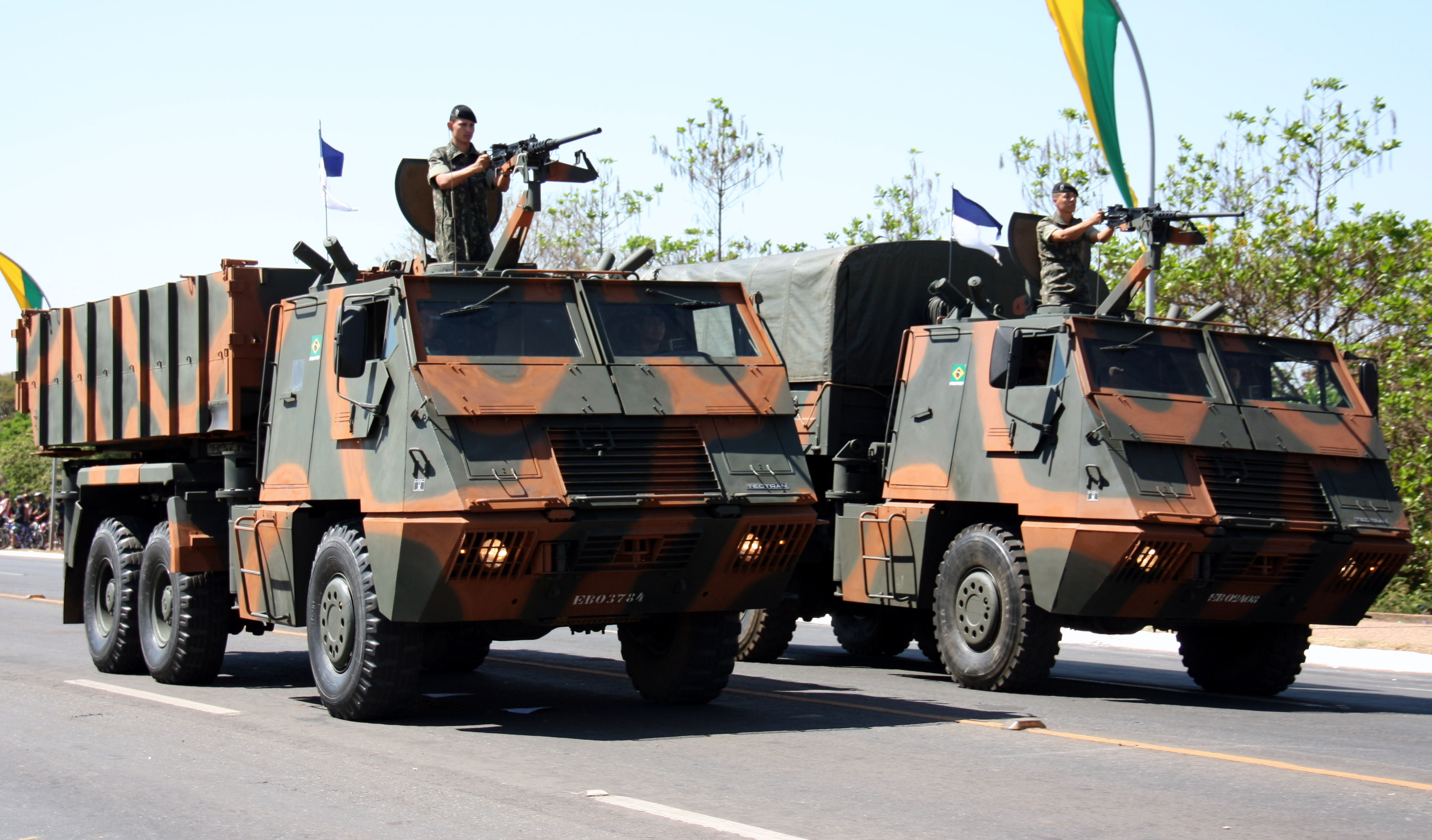 Exército Brasileiro